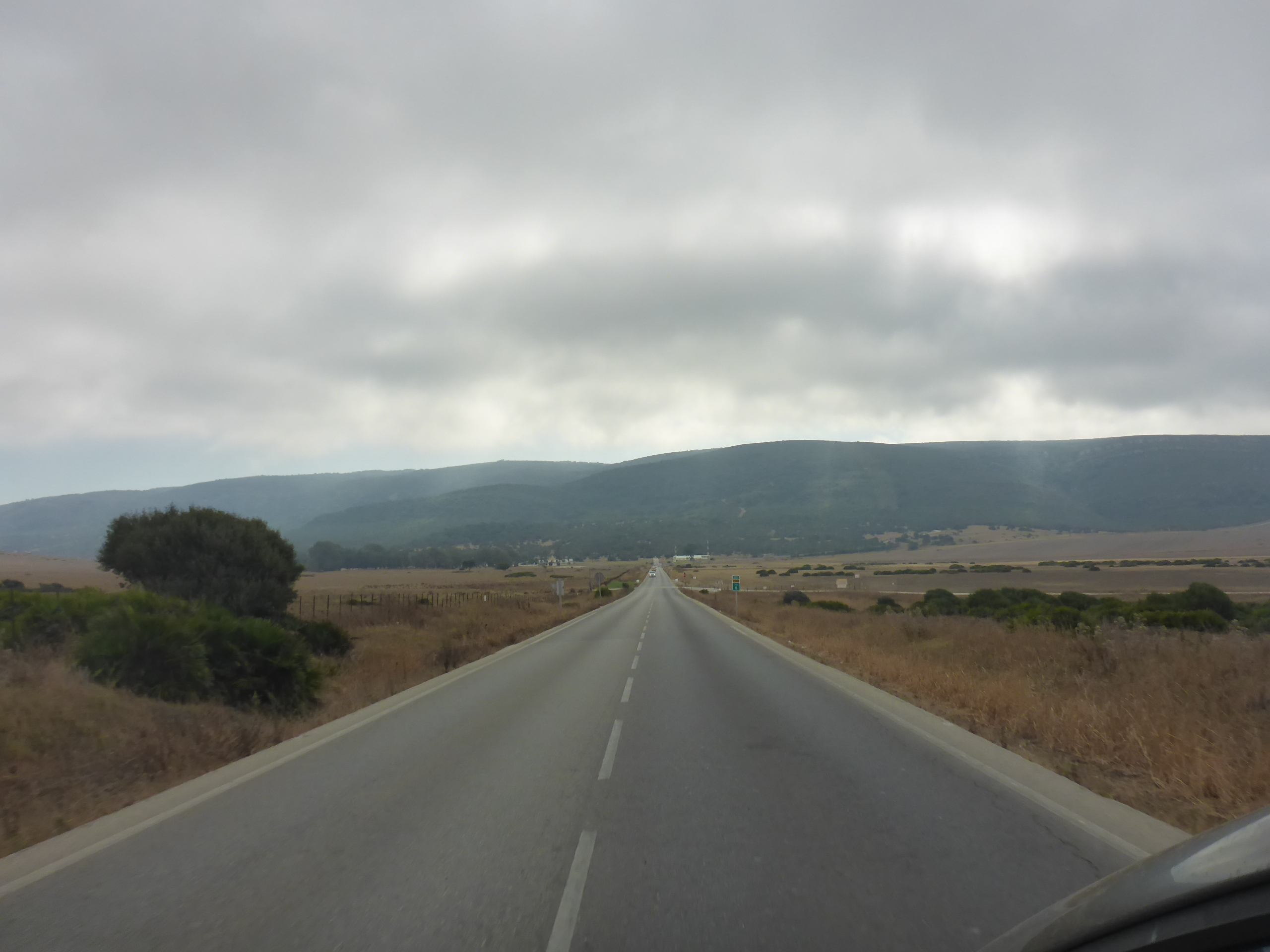 Sierra del Retín - Barbate (Andalucía , España)